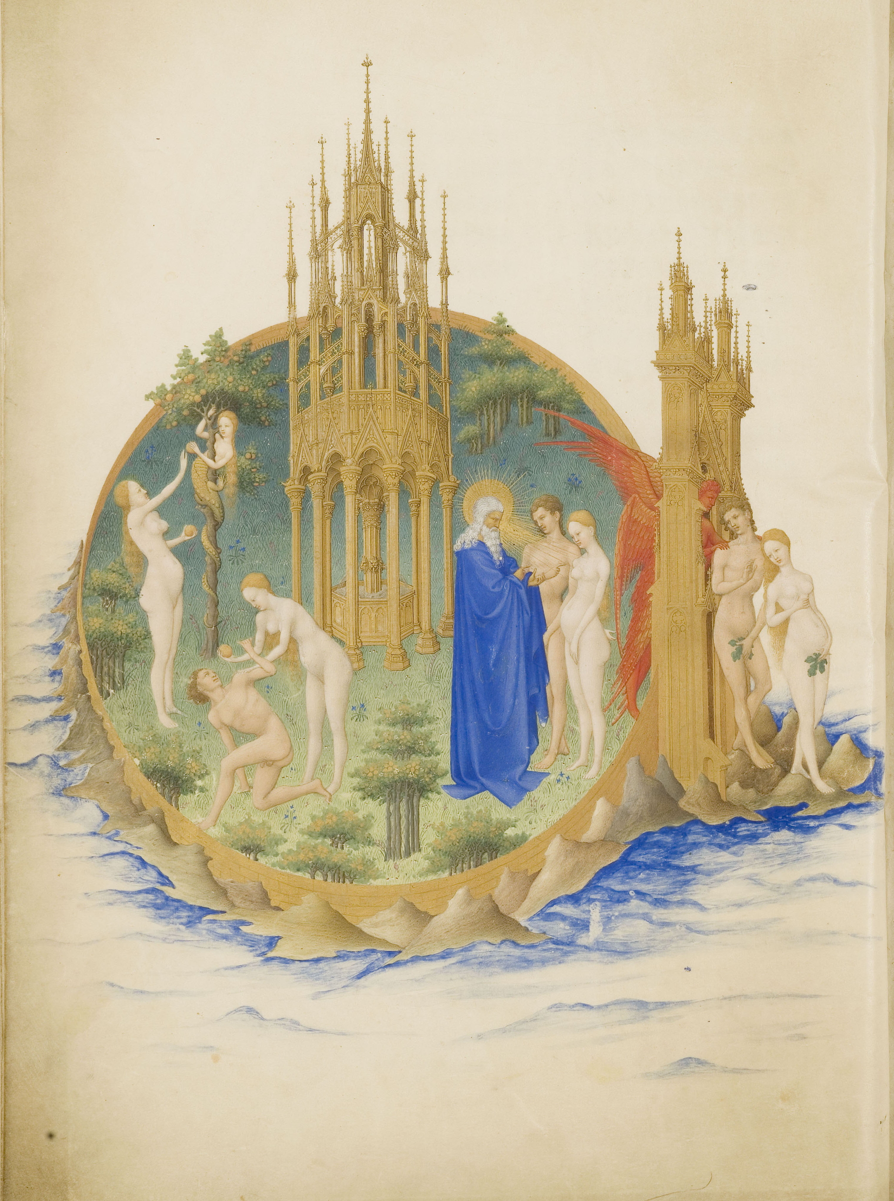 quatre scènes sont représentées : de gauche à droite ; un serpent au corps de sirène tend à Ève le fruit de l'Arbre de la connaissance du bien et du mal ; Ève offre le fruit à Adam ; Dieu punit Adam et Ève, qui sortent du Paradis et prennent conscience de leur nudité en se couvrant d'une feuille de vigne.